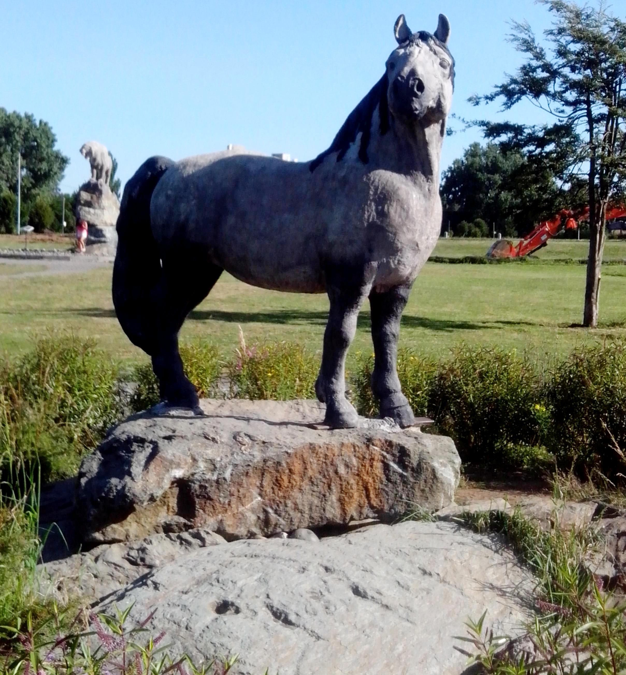 Escultura de un Caballo sudamericano extinto (subgénero Equus (Amerhippus)) en el Parque Pleistocénico de Osorno (Parque chuyaca - Osorno)